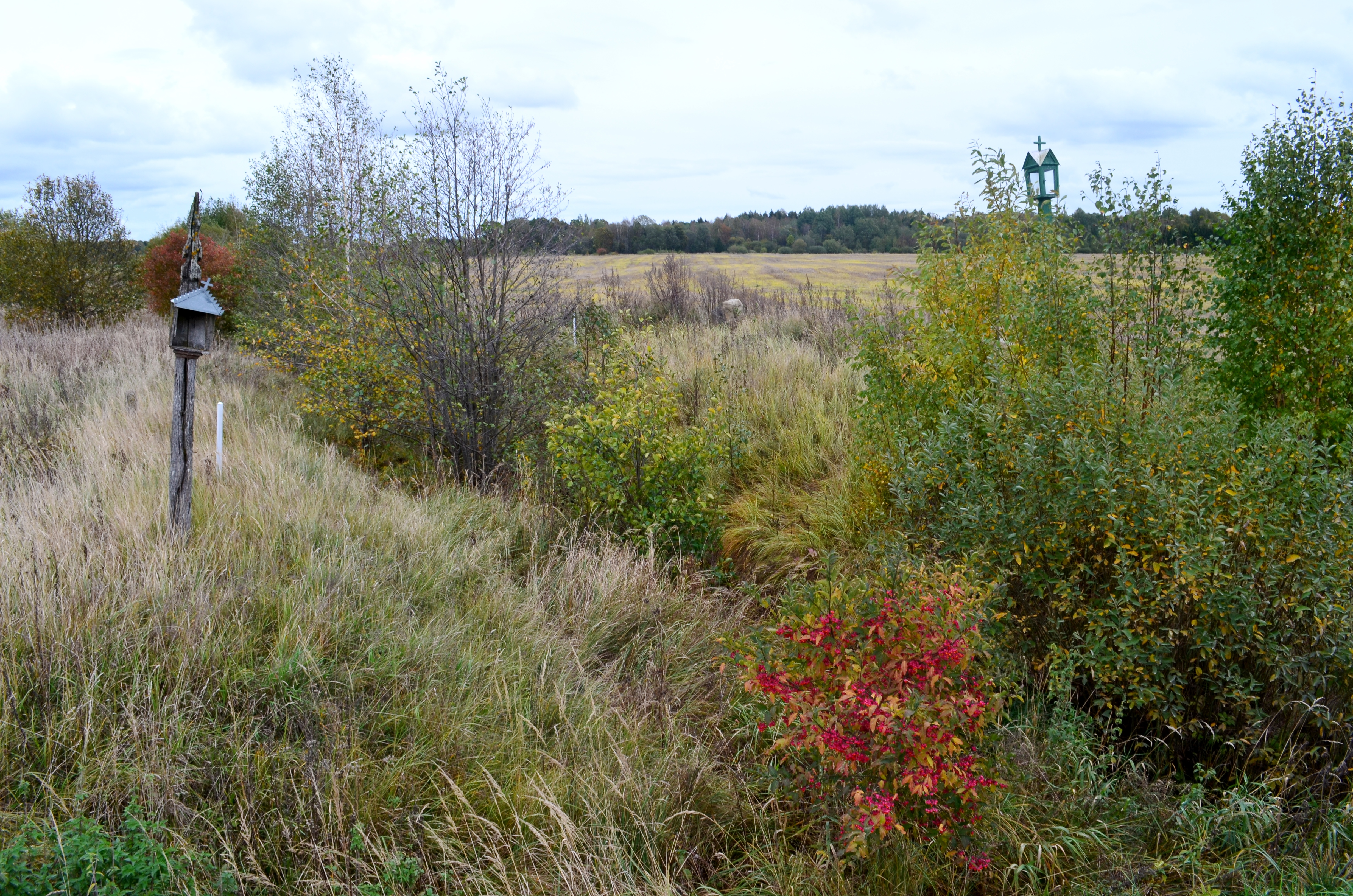 Koplytstulpiai prie Vaineikupio netoli Vaineikių, Kretingos raj.